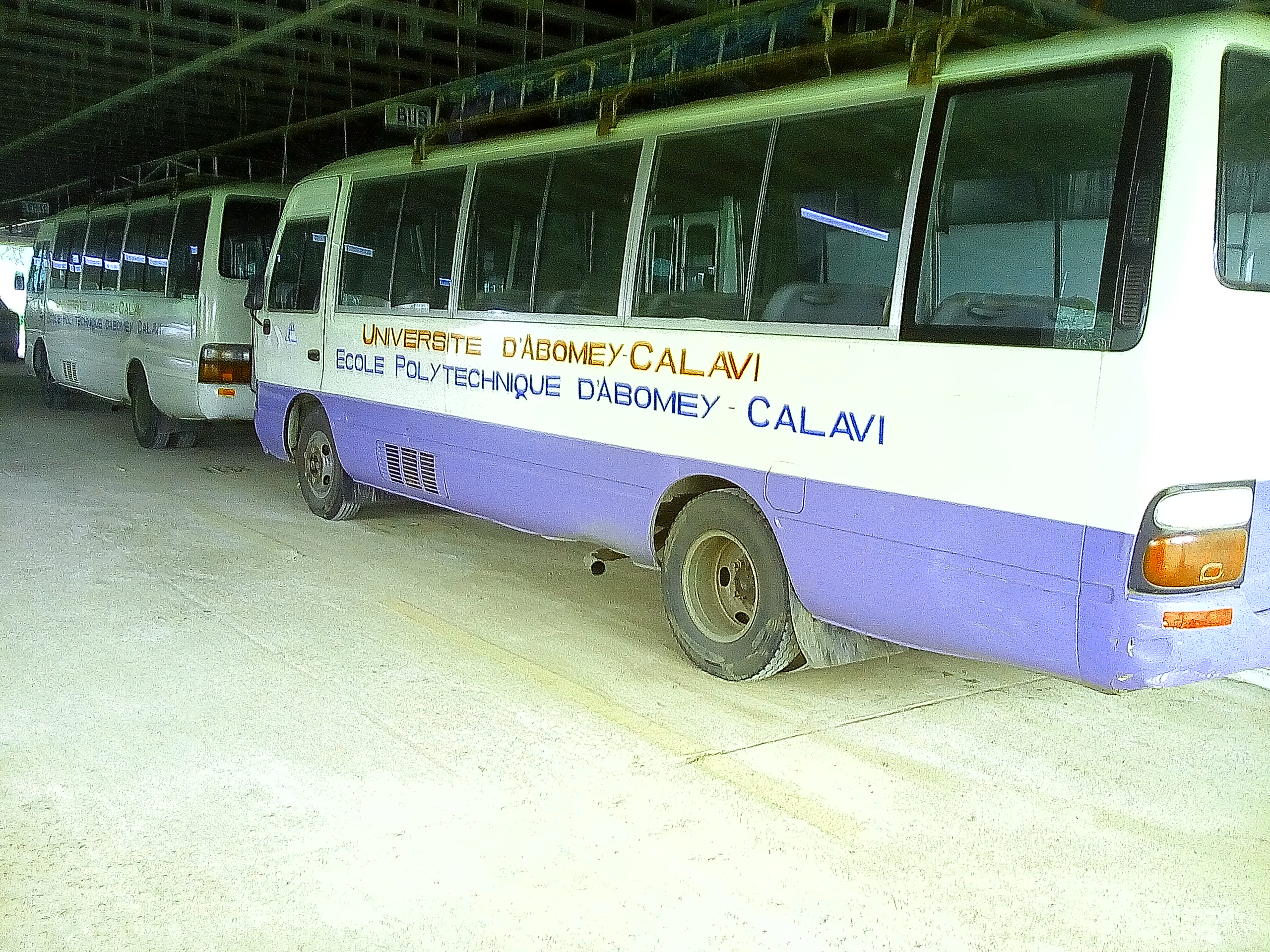 PARKING DE L'ÉPAC